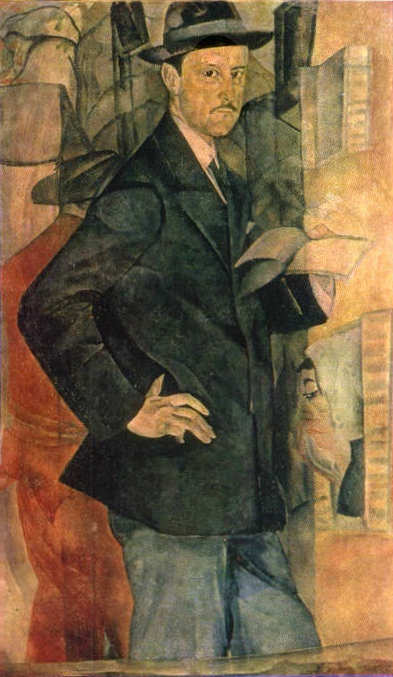 Добужинский